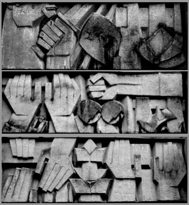 St. Christoph (außen), Mainz, Kunstobjekt von Heinz Hemrich